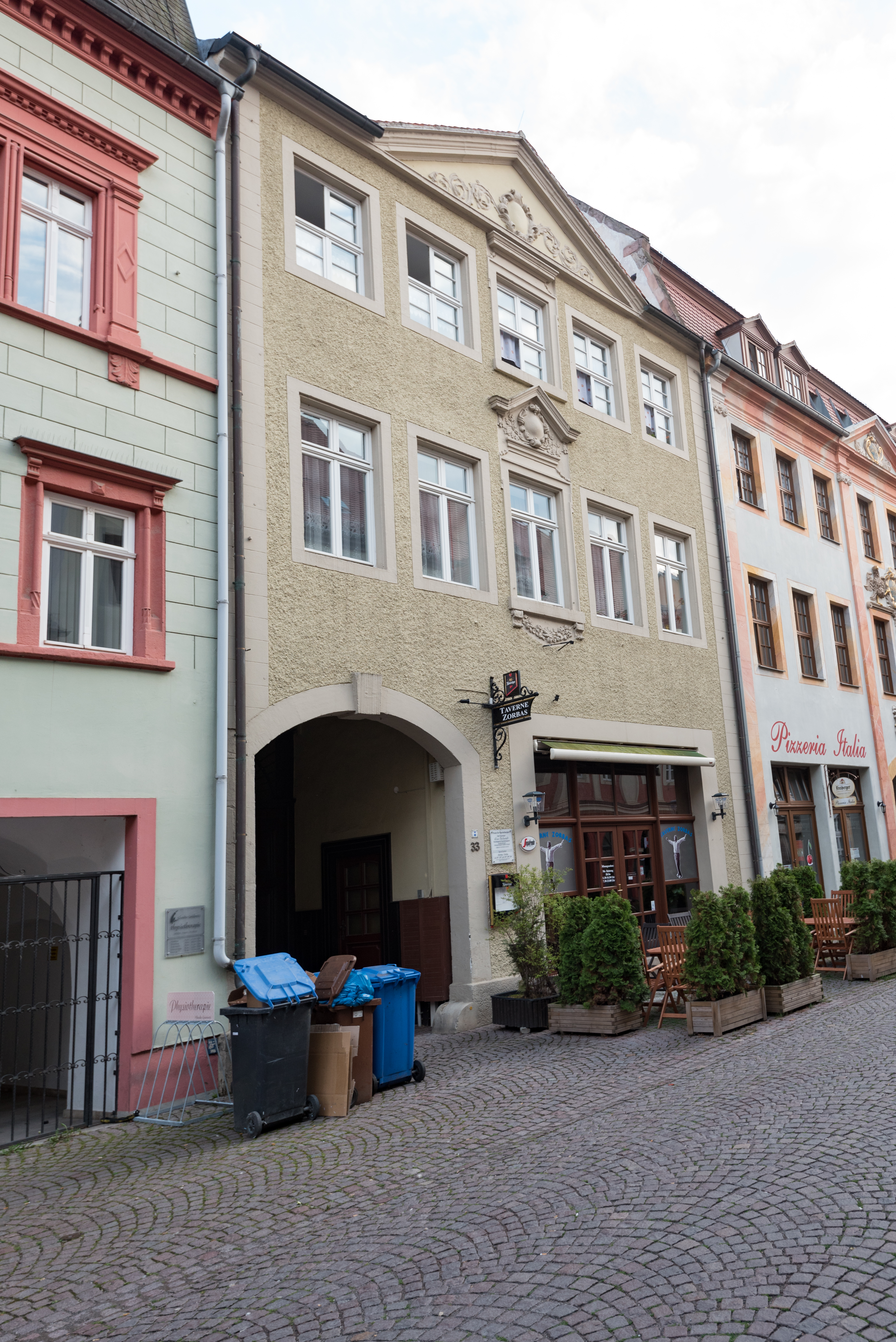 Naumburg (Saale), Salzstraße 33